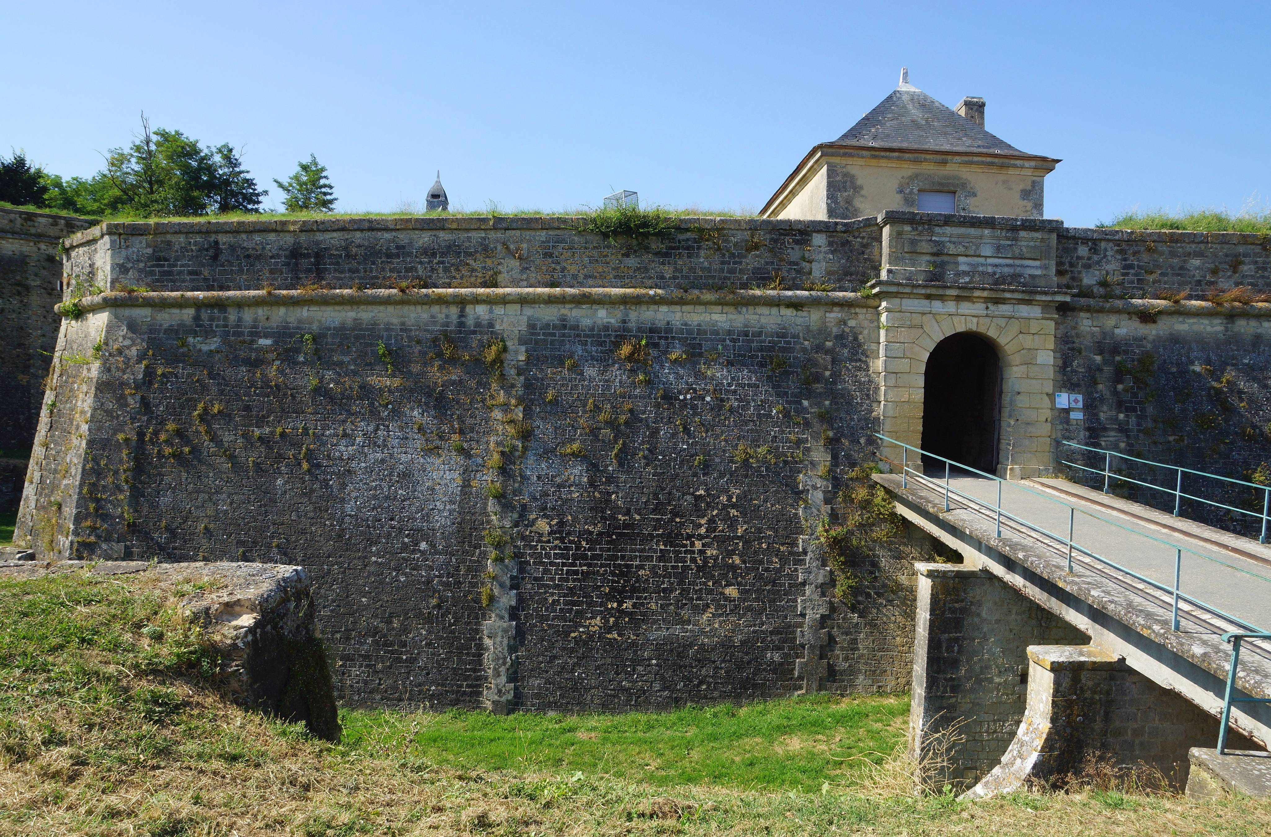 Citadelle de Blaye (erbaut unter Vauban 1680-1689); die ortsfesten Brücken und Übergänge zur Zitadelle wurden erst im 18. Jh. geschaffen. Foto Wolfgang Pehlemann DSC08870